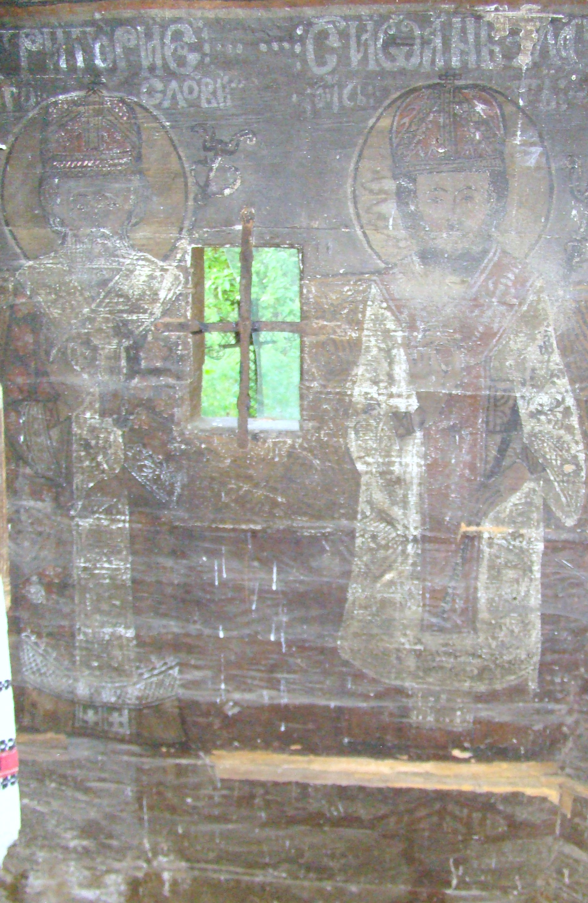 Biserica de lemn din Someșu Rece, județul Cluj